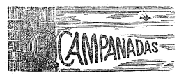 Capçalera d'una secció de Lo Trronyau